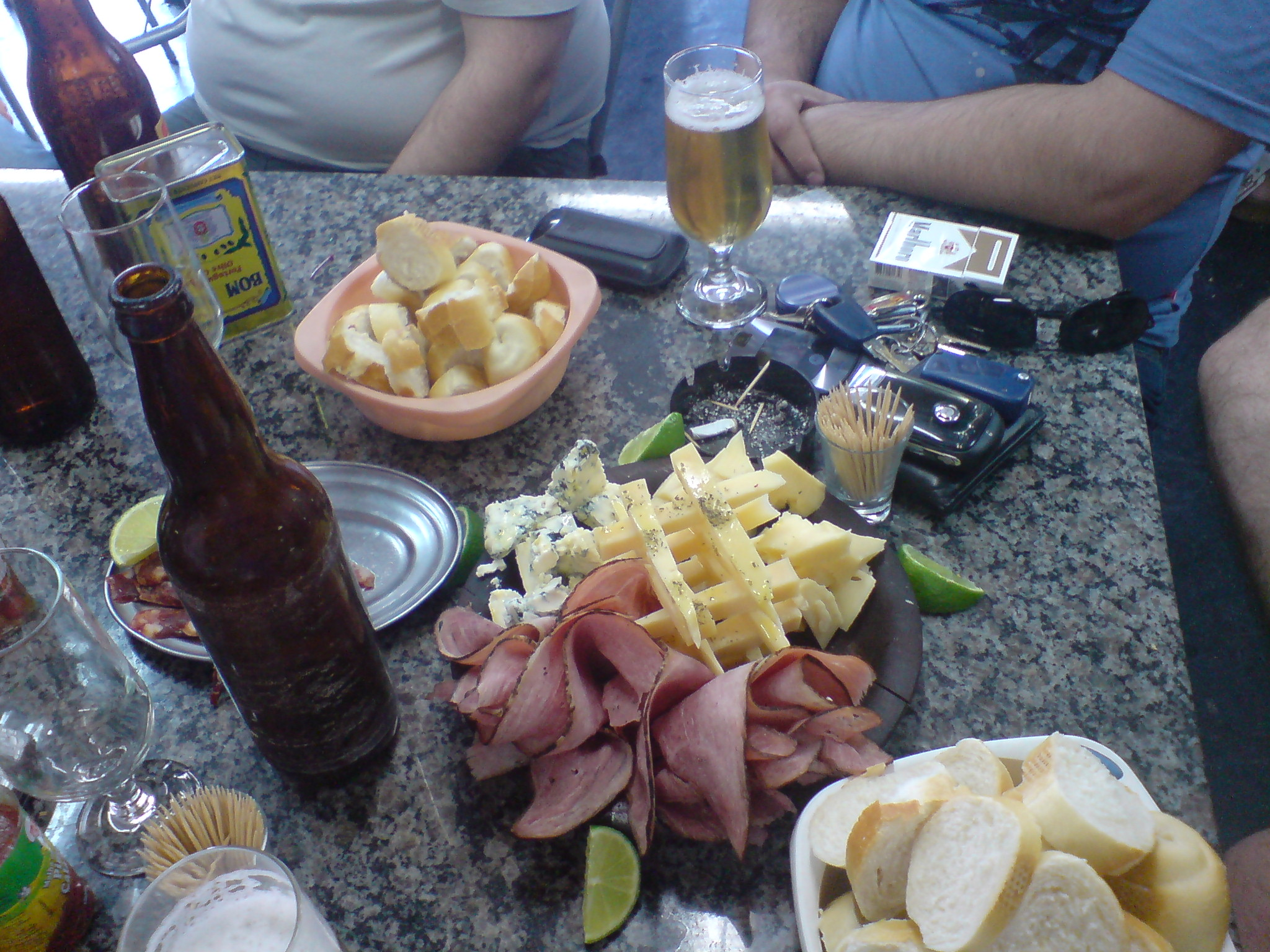 Bebida e comida principal de um boteco.